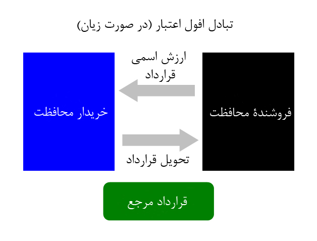 نمودار قرارداد تبادل افول اعتبار در صورت زیان